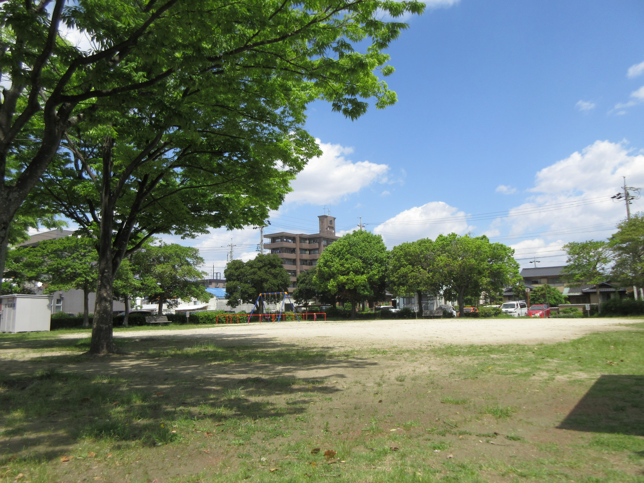 祈祷野公園（岡崎市江口）